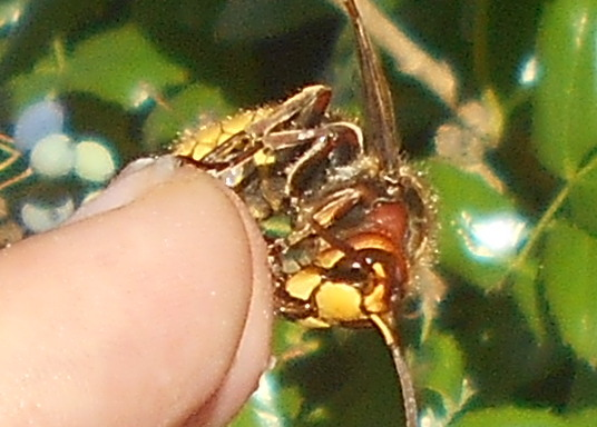 Dělnice sršně obecné při krmení na ruce